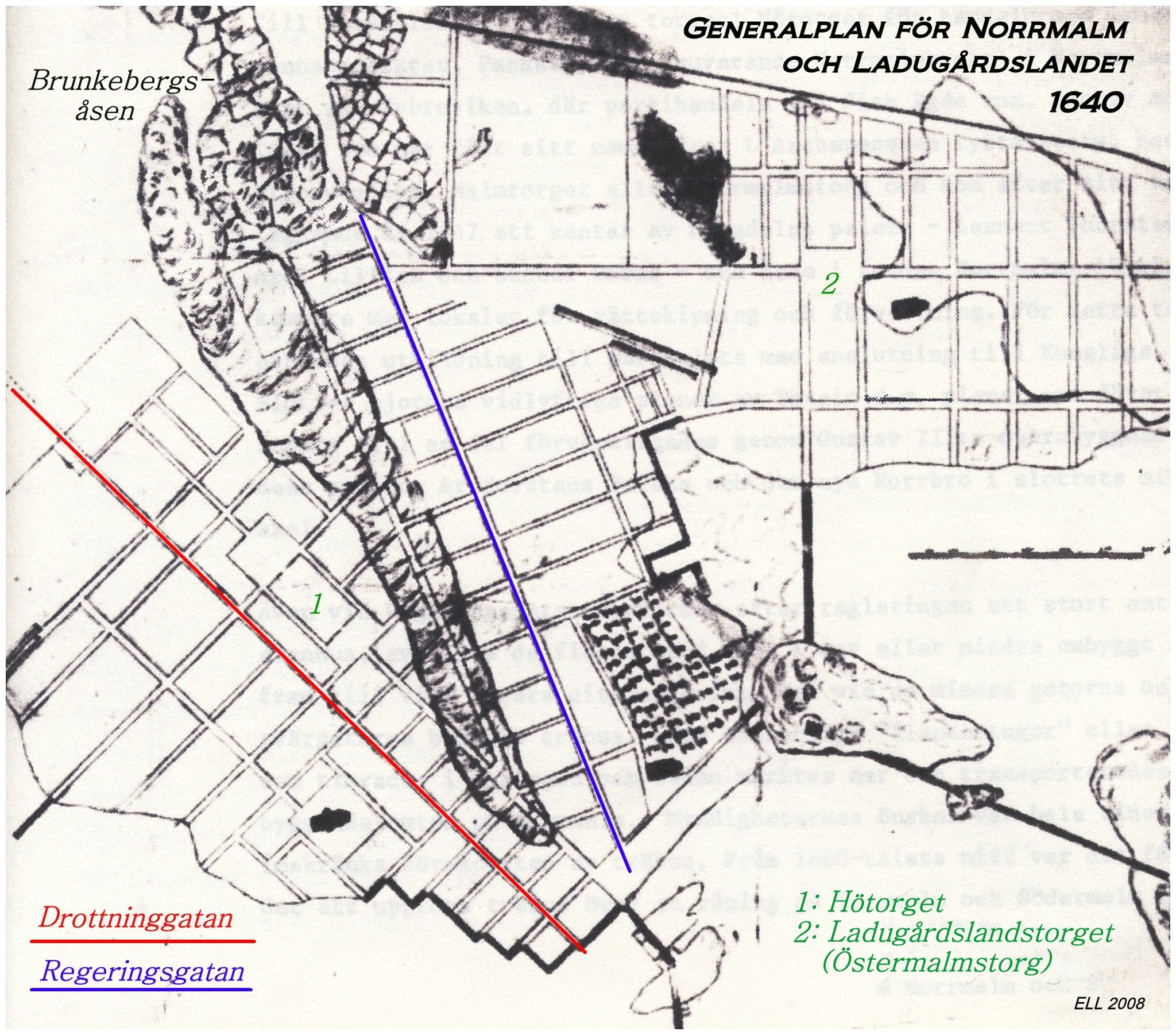 Generalplan för Norrmalm och Ladugårdslandet 1640. Förklaringar har lagds in av Holger Ellgaard 2008